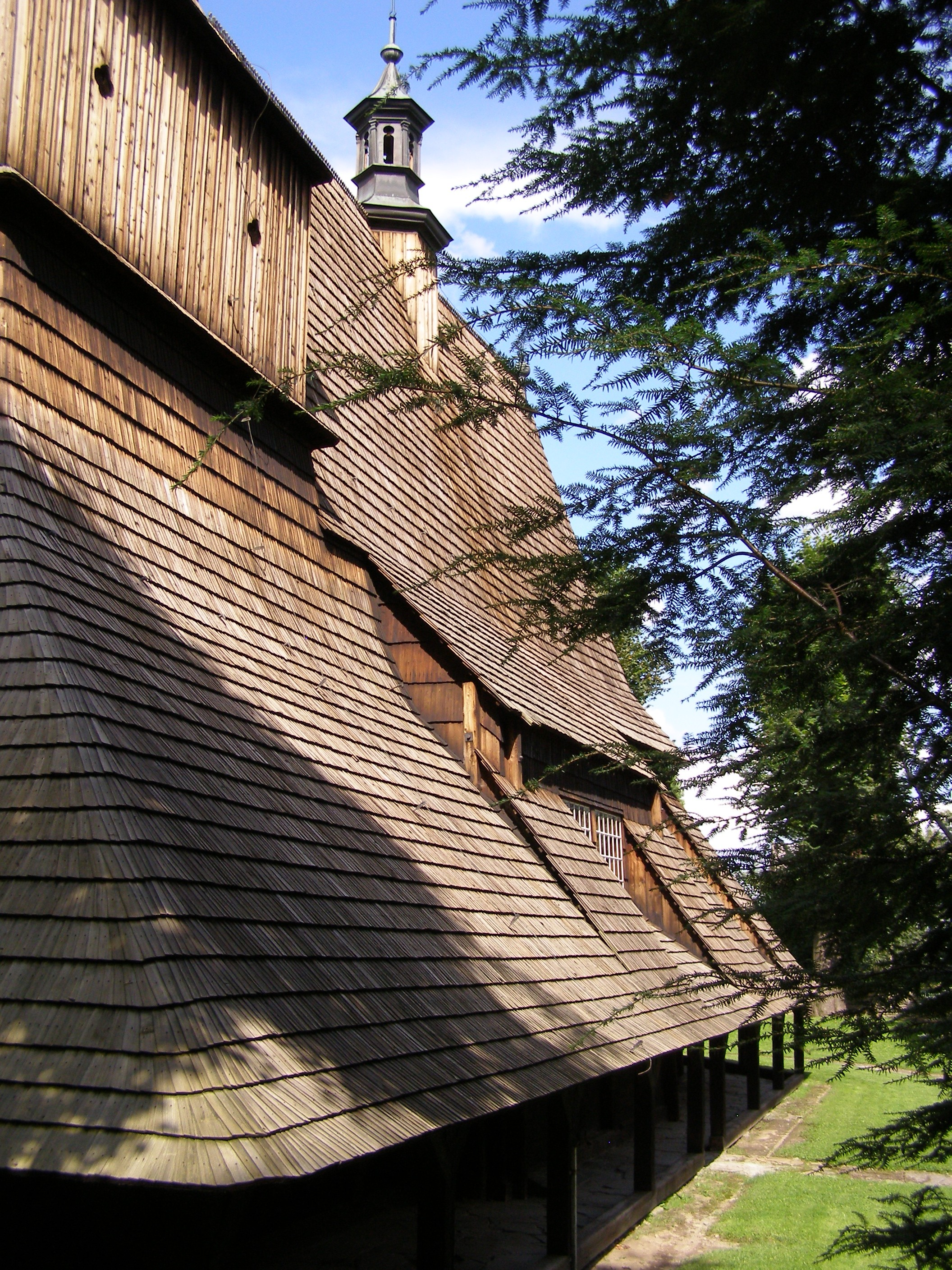 Sękowa - kościół św. Filipa i św. Jakuba